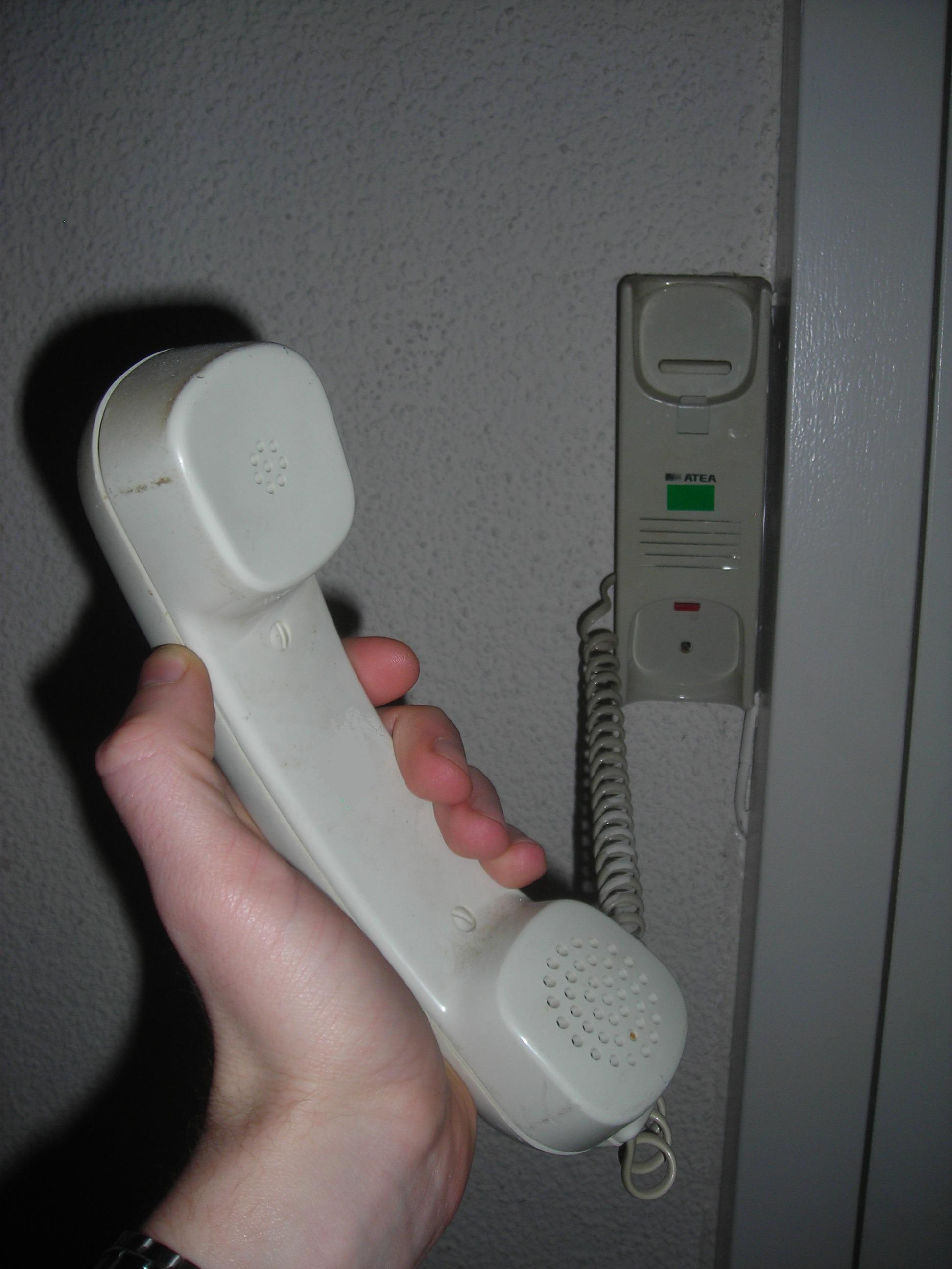 A point2point intercom